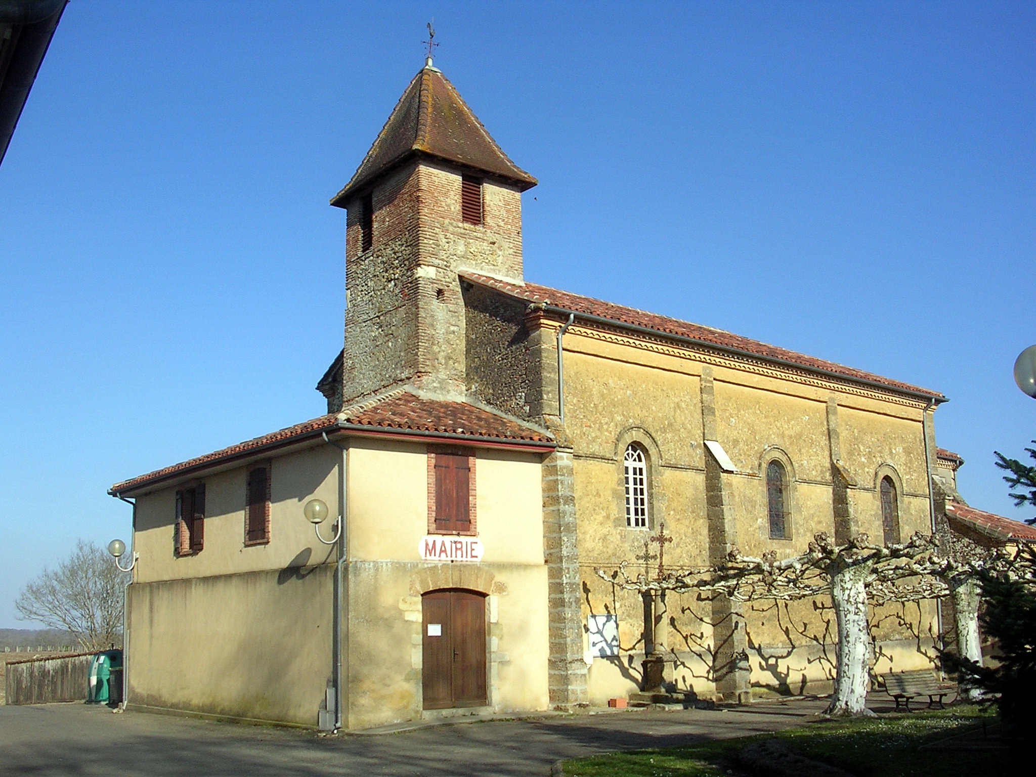 Arthez-d'Armagnac, église et mairie, département français des Landes